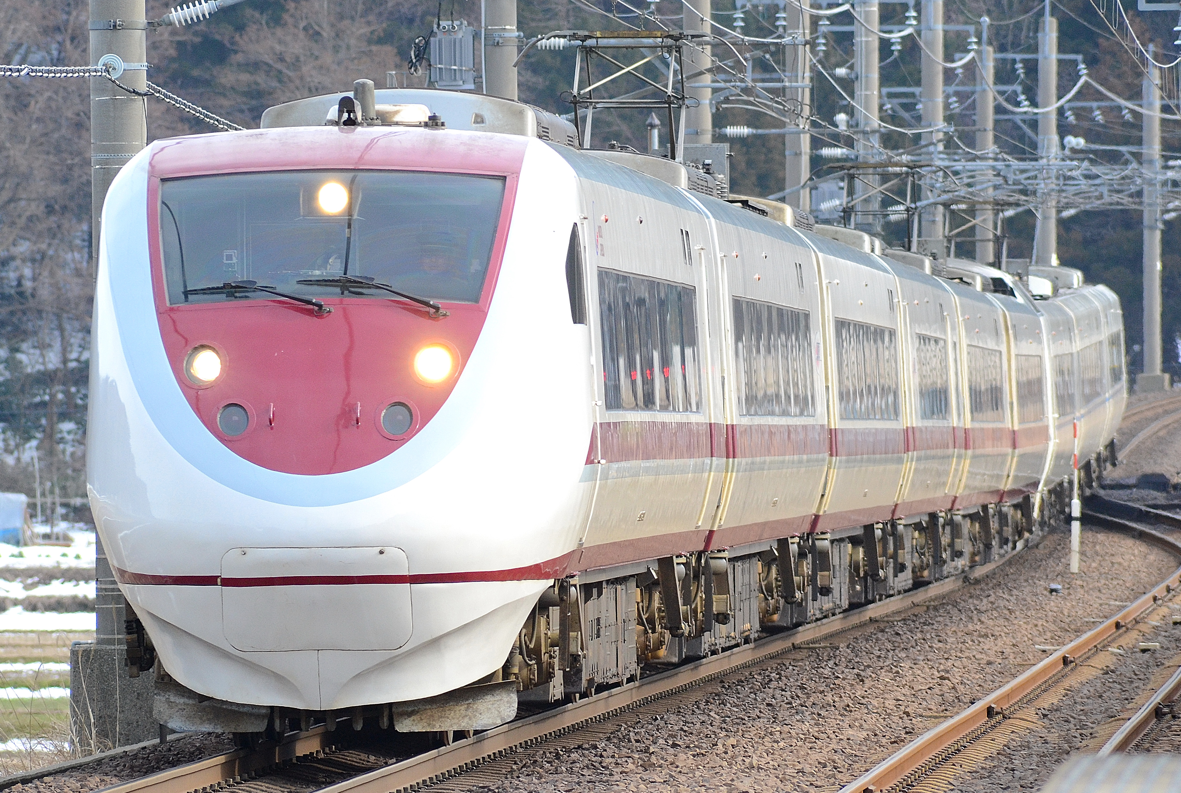 ほくほく線くびき駅を通過する、金沢行き特急｢はくたか｣13号（ホームから撮影）